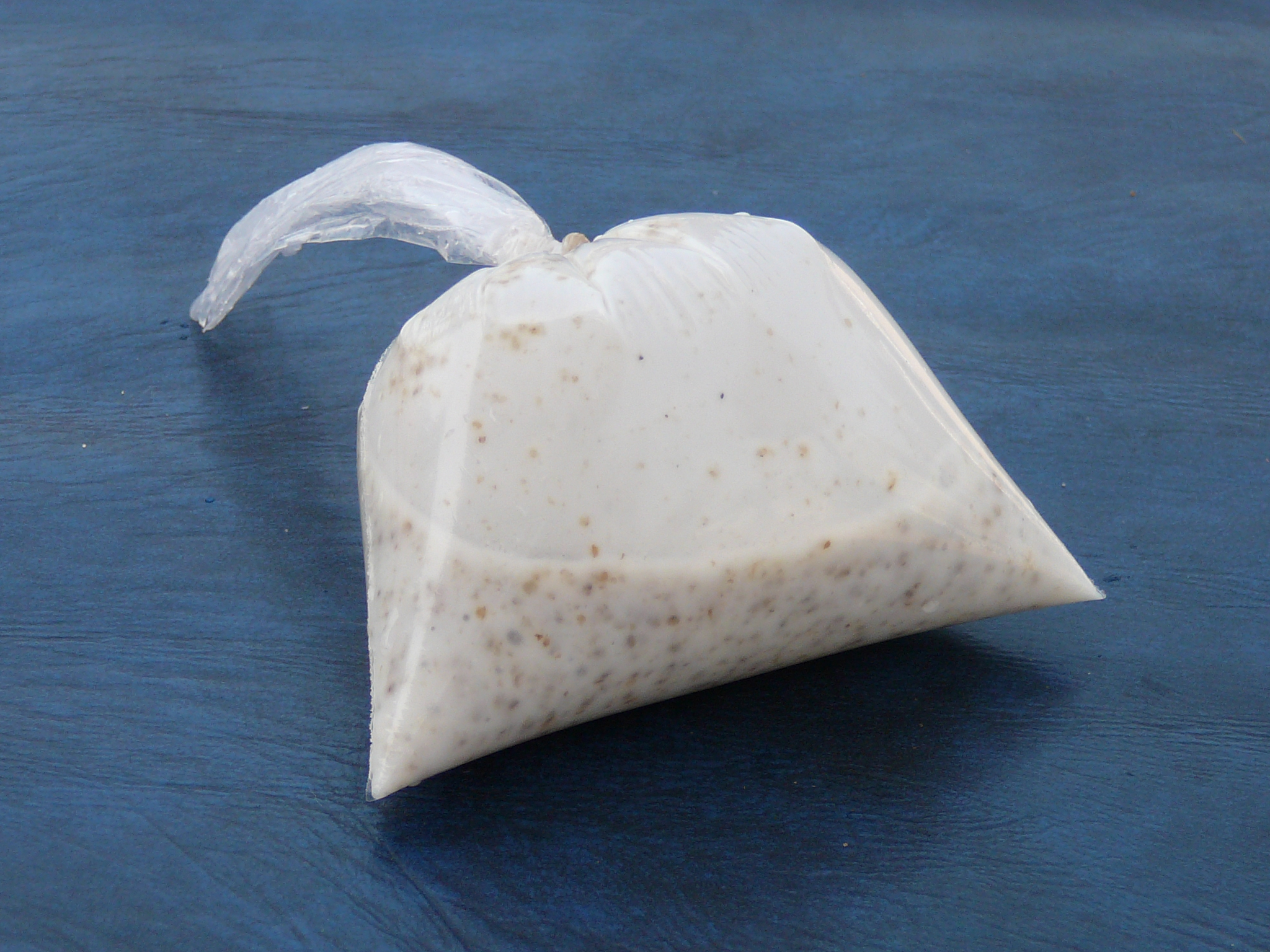 Chakery (oder Thiakry), eine Süßspeise in Gambia und Senegal